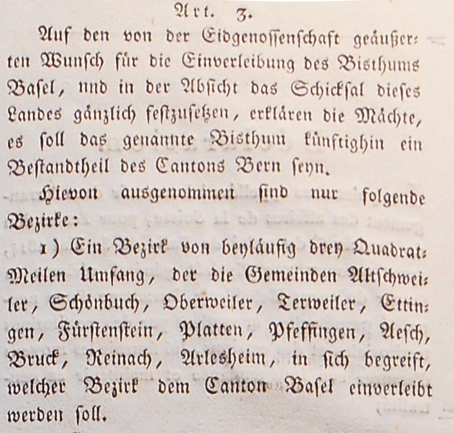 Erklärung des Wiener Kongresses vom 20. 3. 1815 zur Zuweisung des Birseck. 1 Meile entspricht 4 Kilometern, die Grössenangabe stimmt.